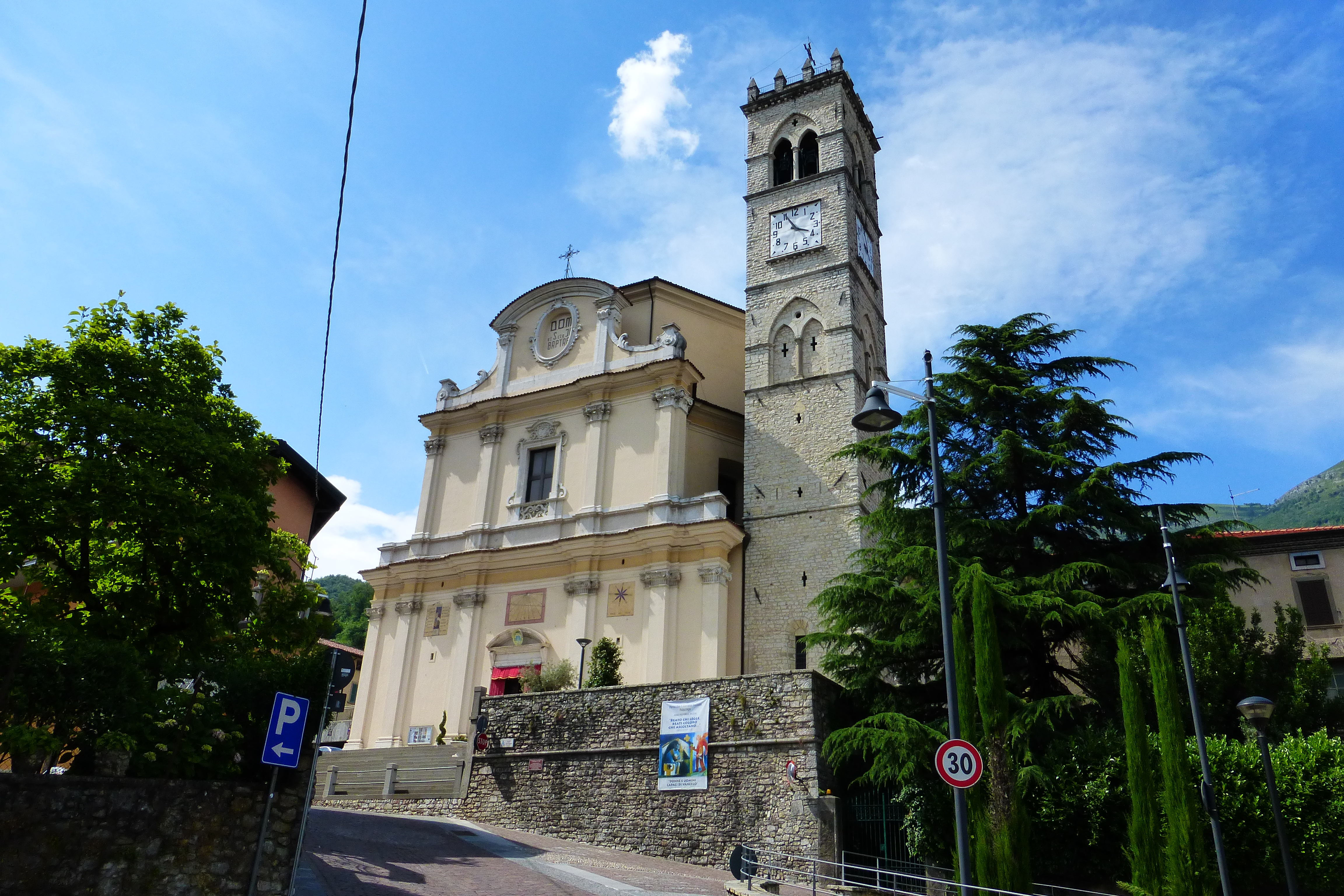 Chiesa parrocchiale s. giovanni battista - Palazzago (BG)